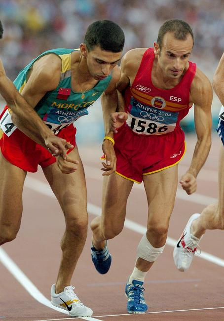 Carlos García (derecha) y Hicham El Guerrouj- Atenas 2004